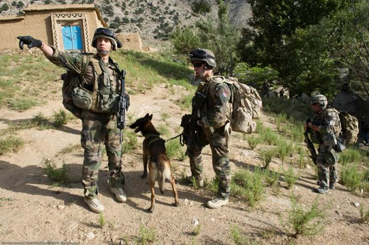 2quipe cyno intérgrée dans un groupe de combat